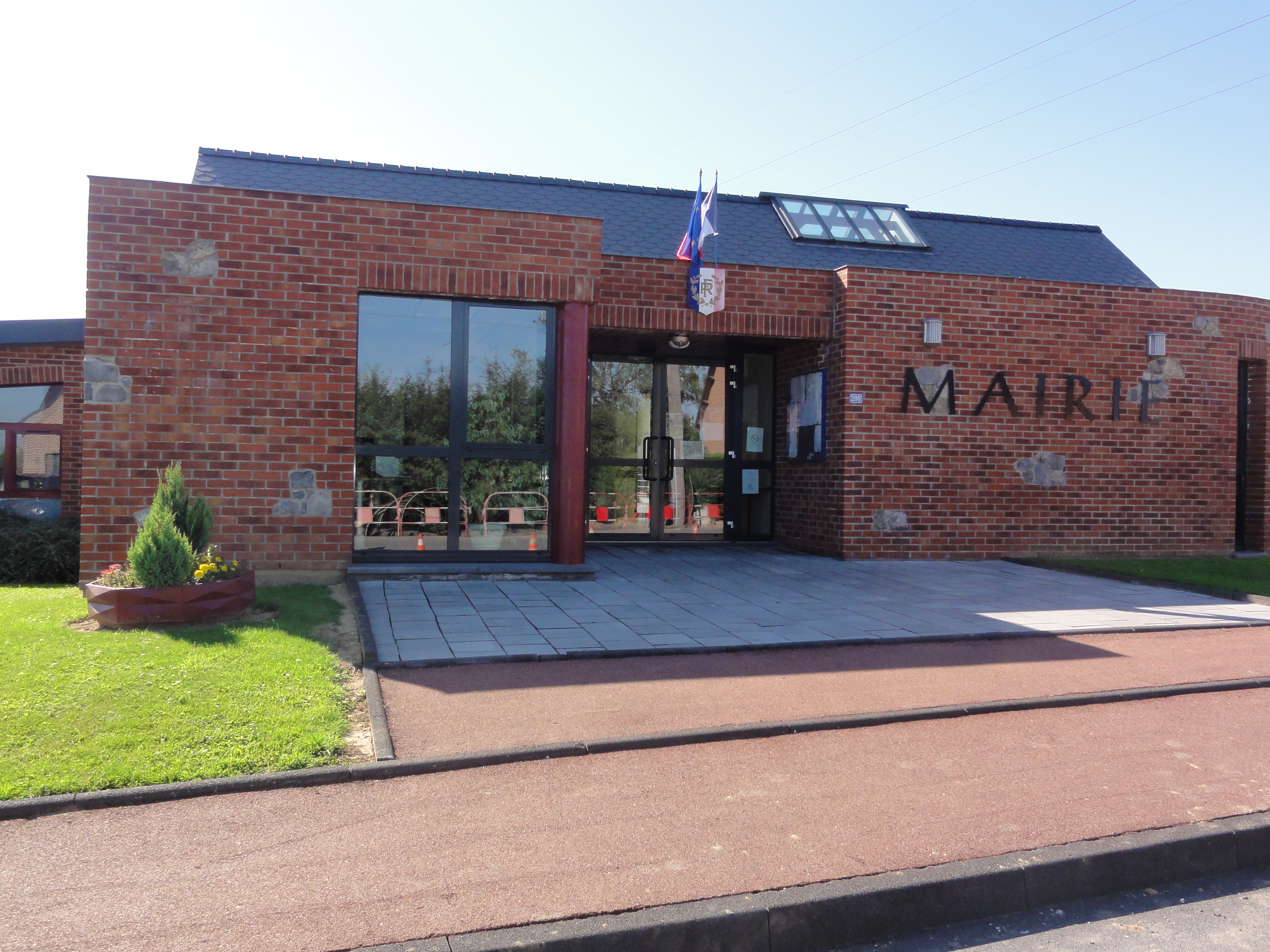 Obies (Nord, Fr) mairie